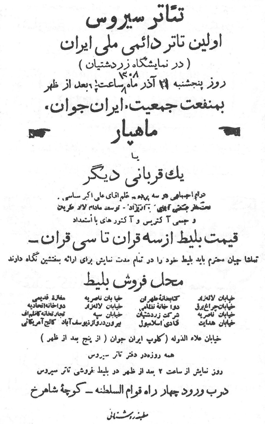 پوستر نمایشنامه (ماهپار) در سال 1308